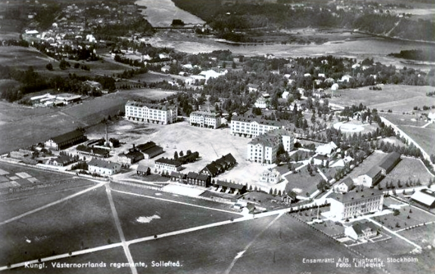 Flygvy över Västernorrlands regemente och Garnisionssjukhuset i Sollefteå.